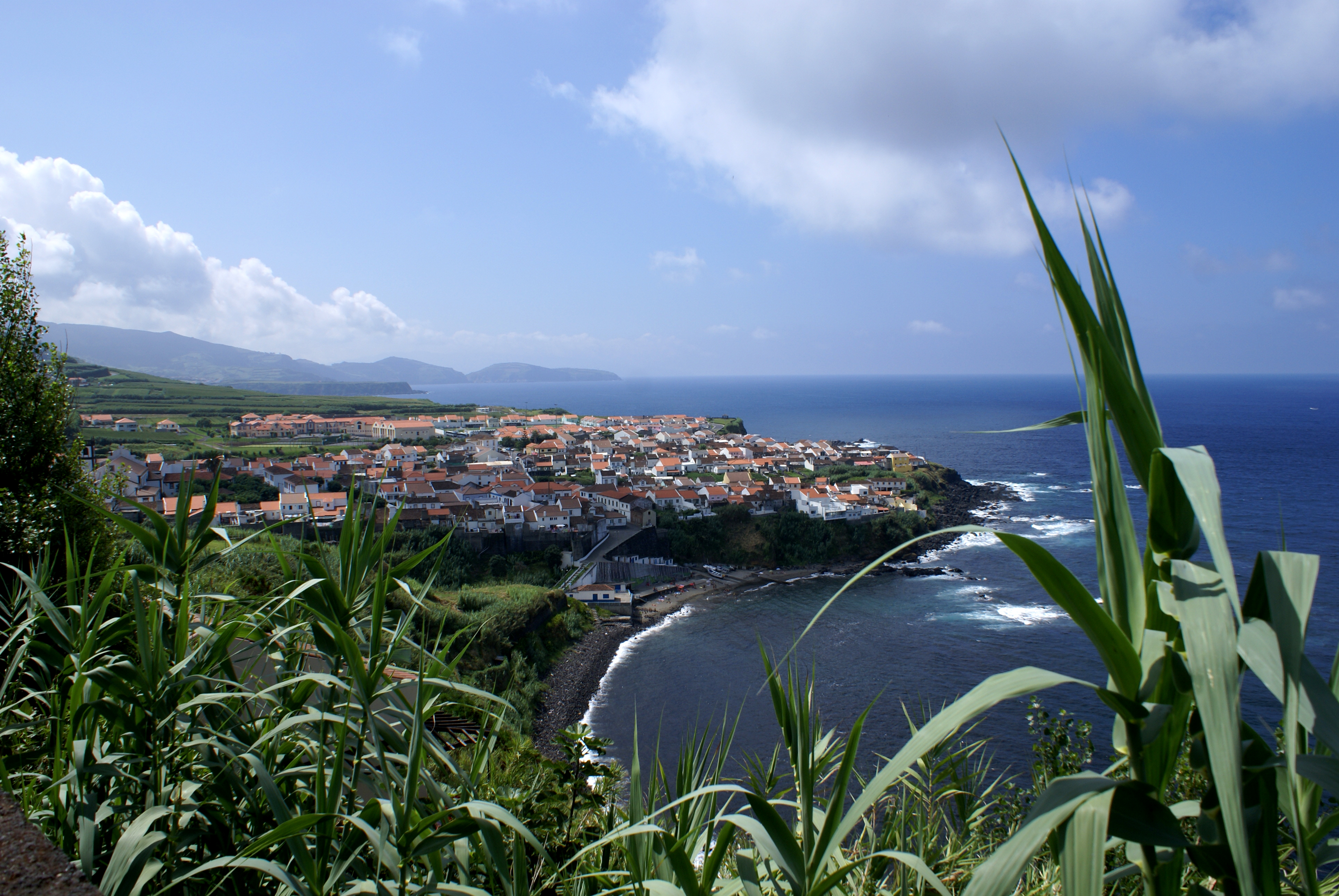 Miradouro da Fonte do Buraco, Maia, ilha de São Miguel, Açores